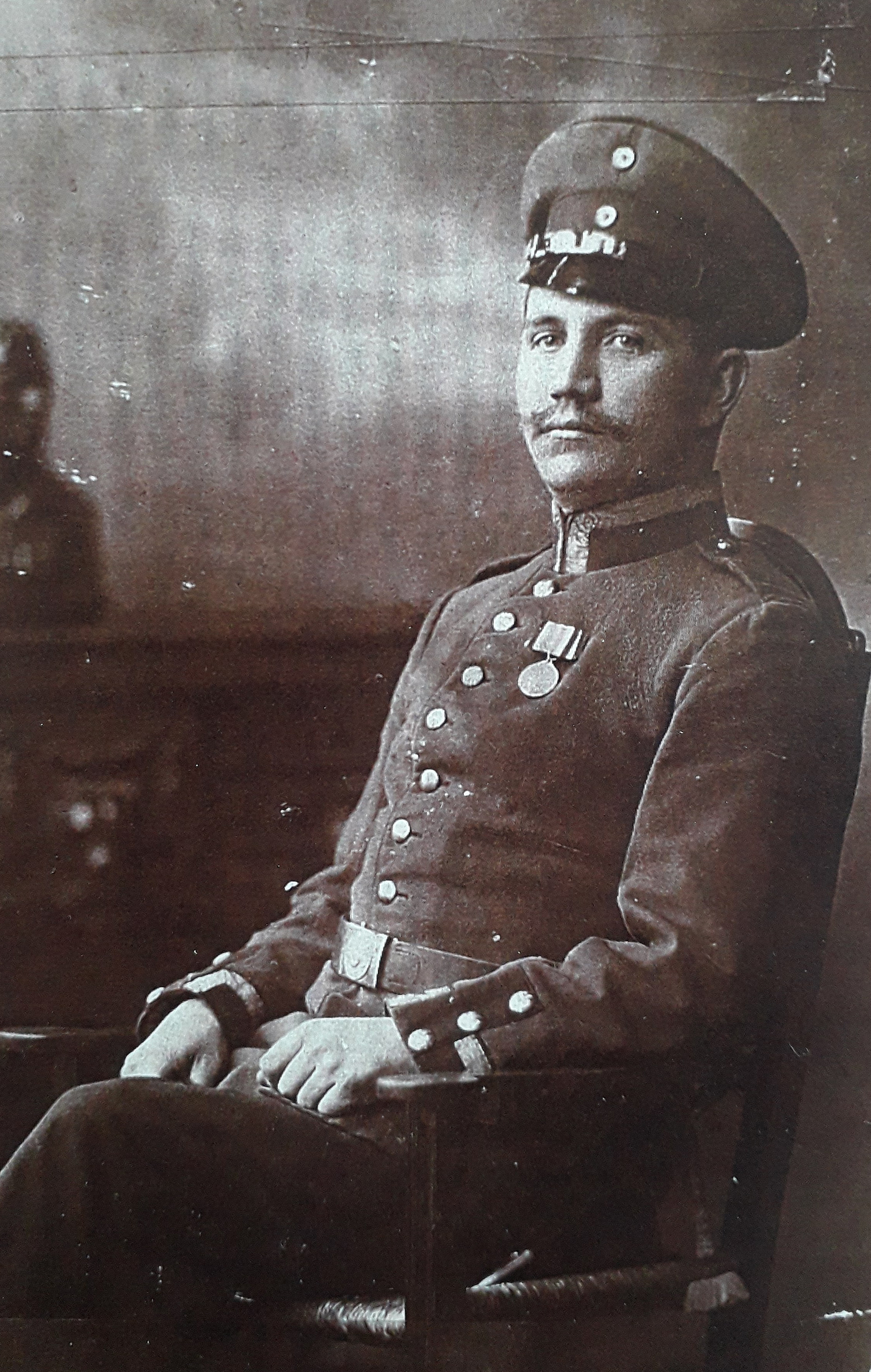 Oleszka